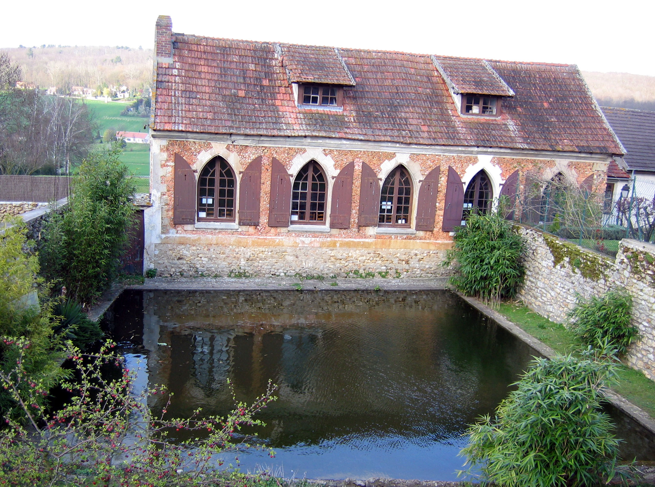 Lavoir de la commune de Bazemont, construit par Parat de Chalandray (78 - Yvelines)